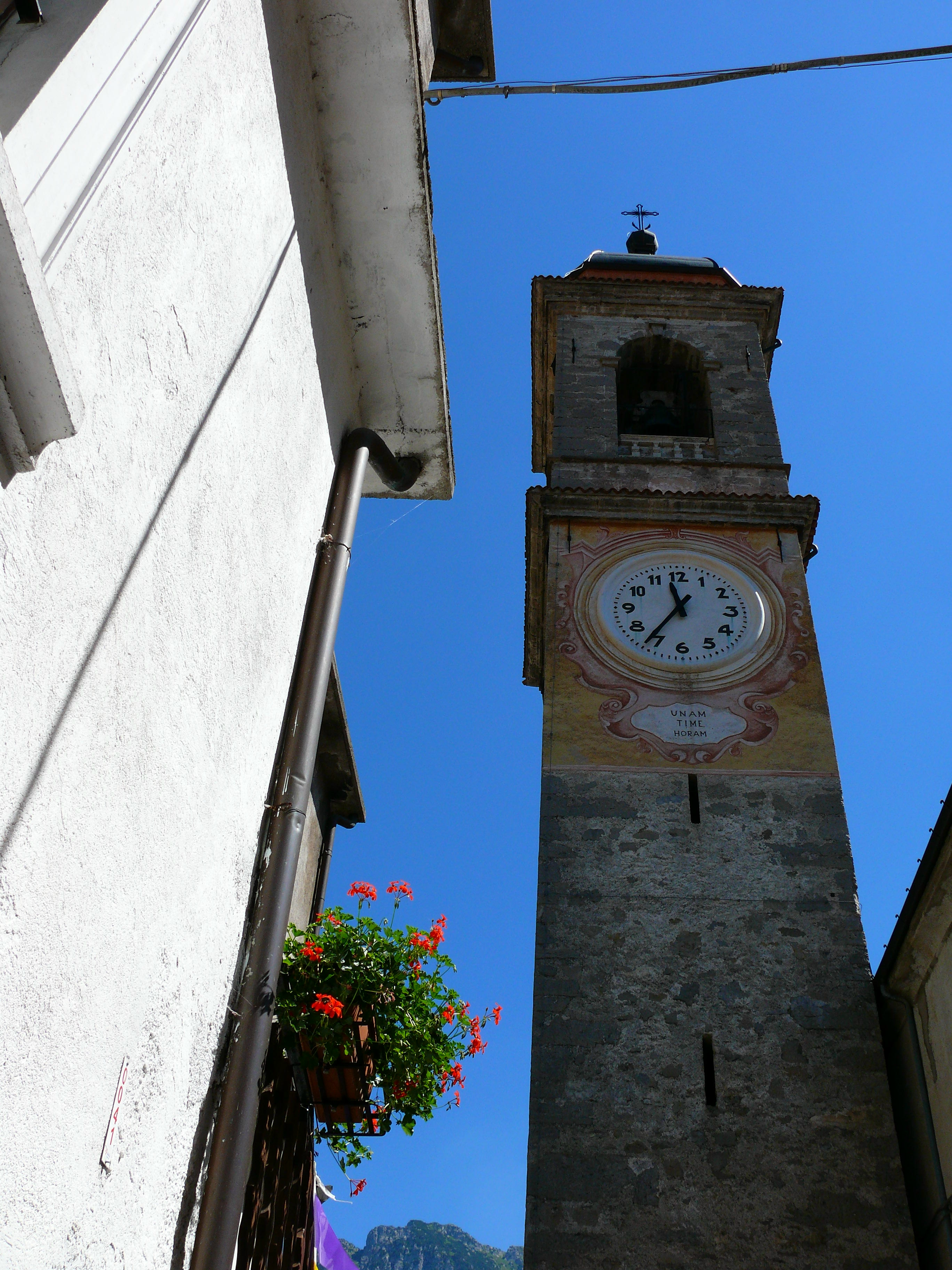 Informazioni file